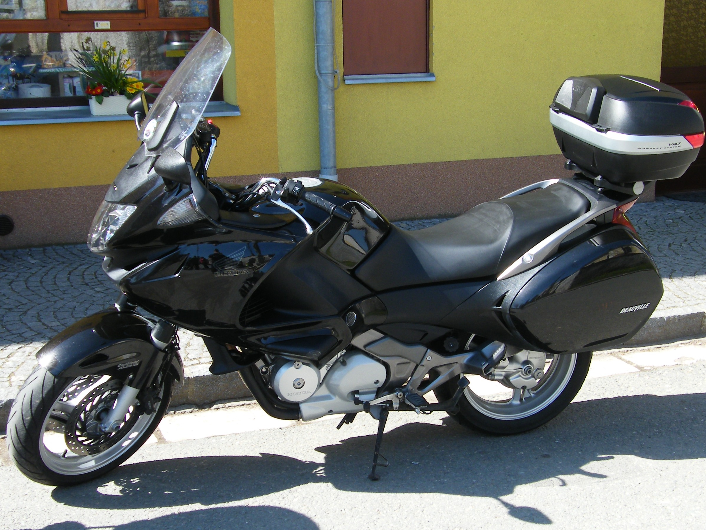 Honda NT 700V Deauville